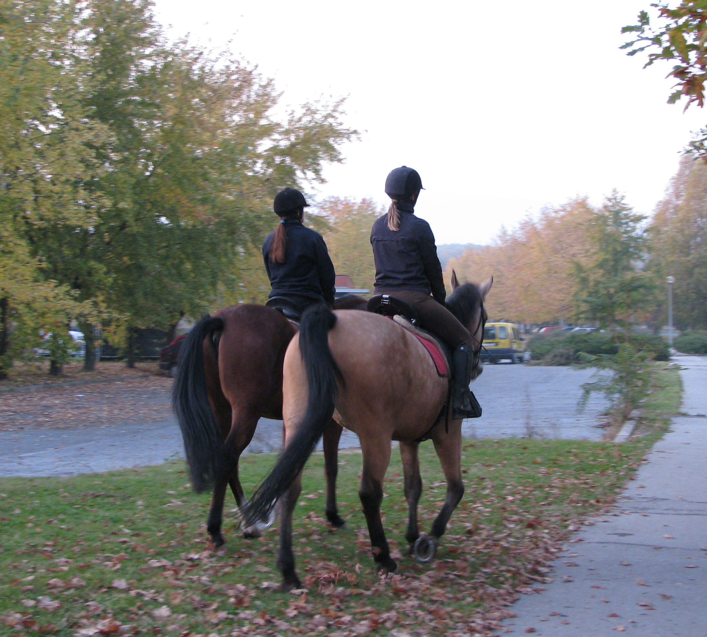 Konjanice u Dubravi, Zagreb